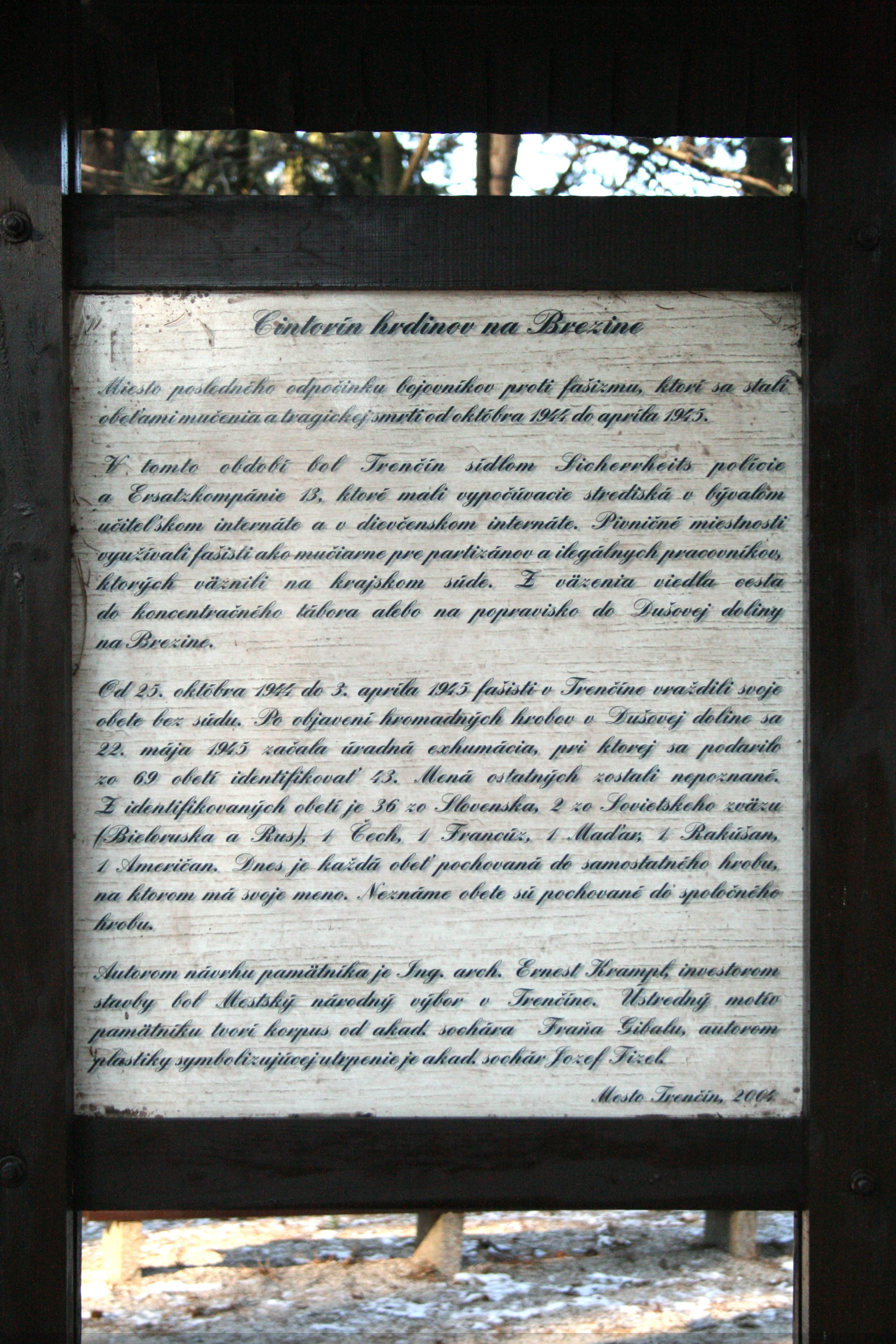 Informačná tabuľa o mieste pochovania fašistami zavraždených bojovníkov za slobodu